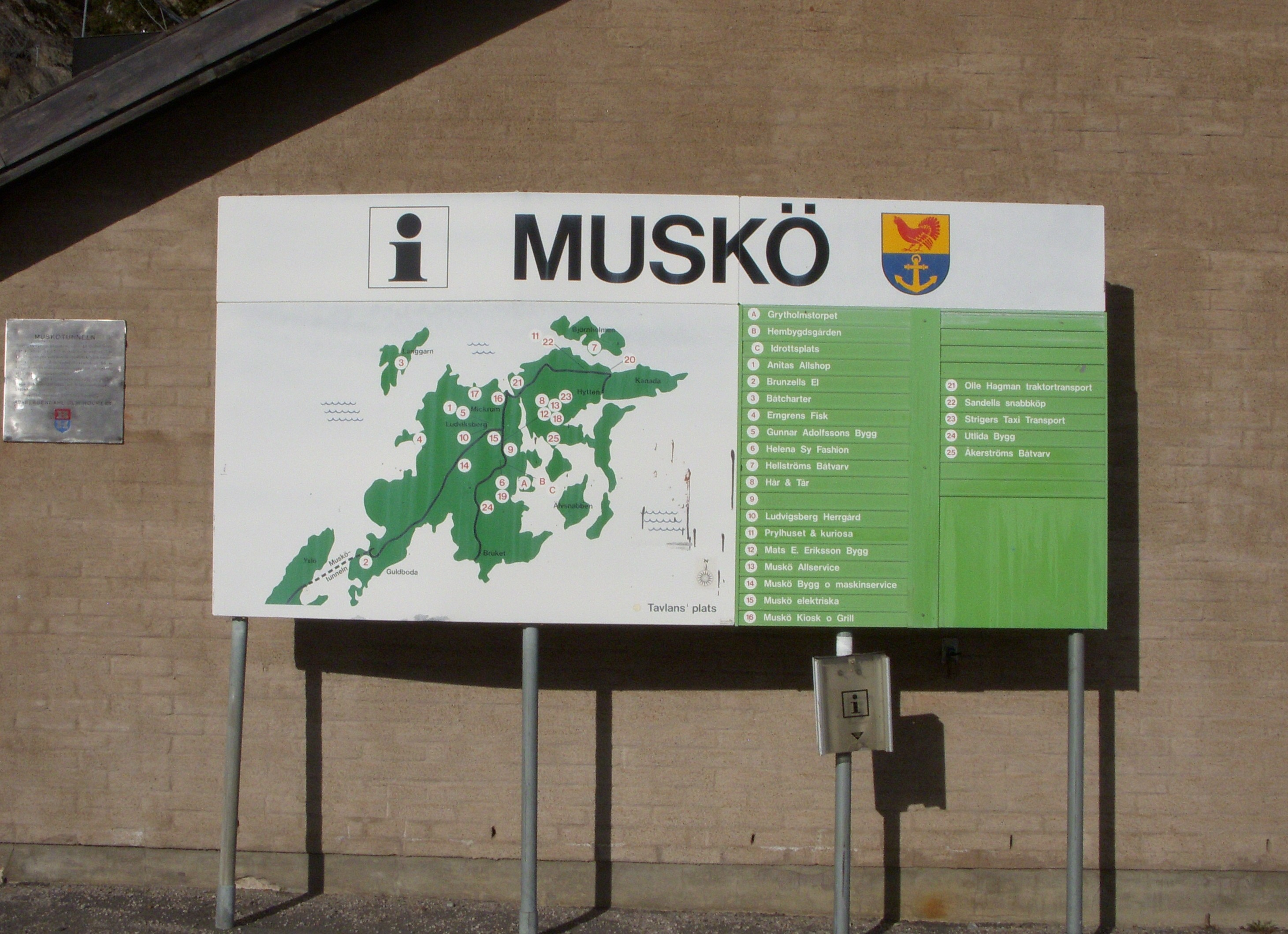 Muskö infotavla vid Muskötunneln